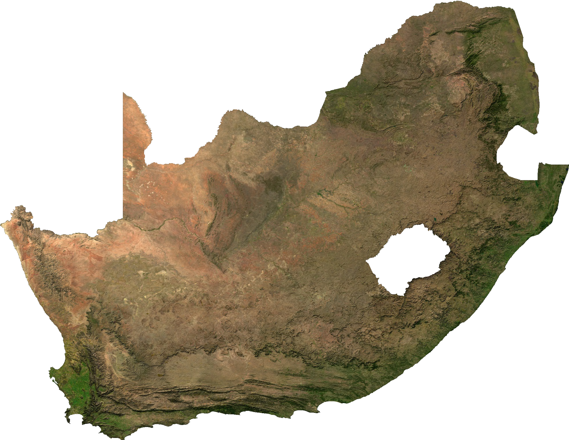 Южно-Африканская Республика